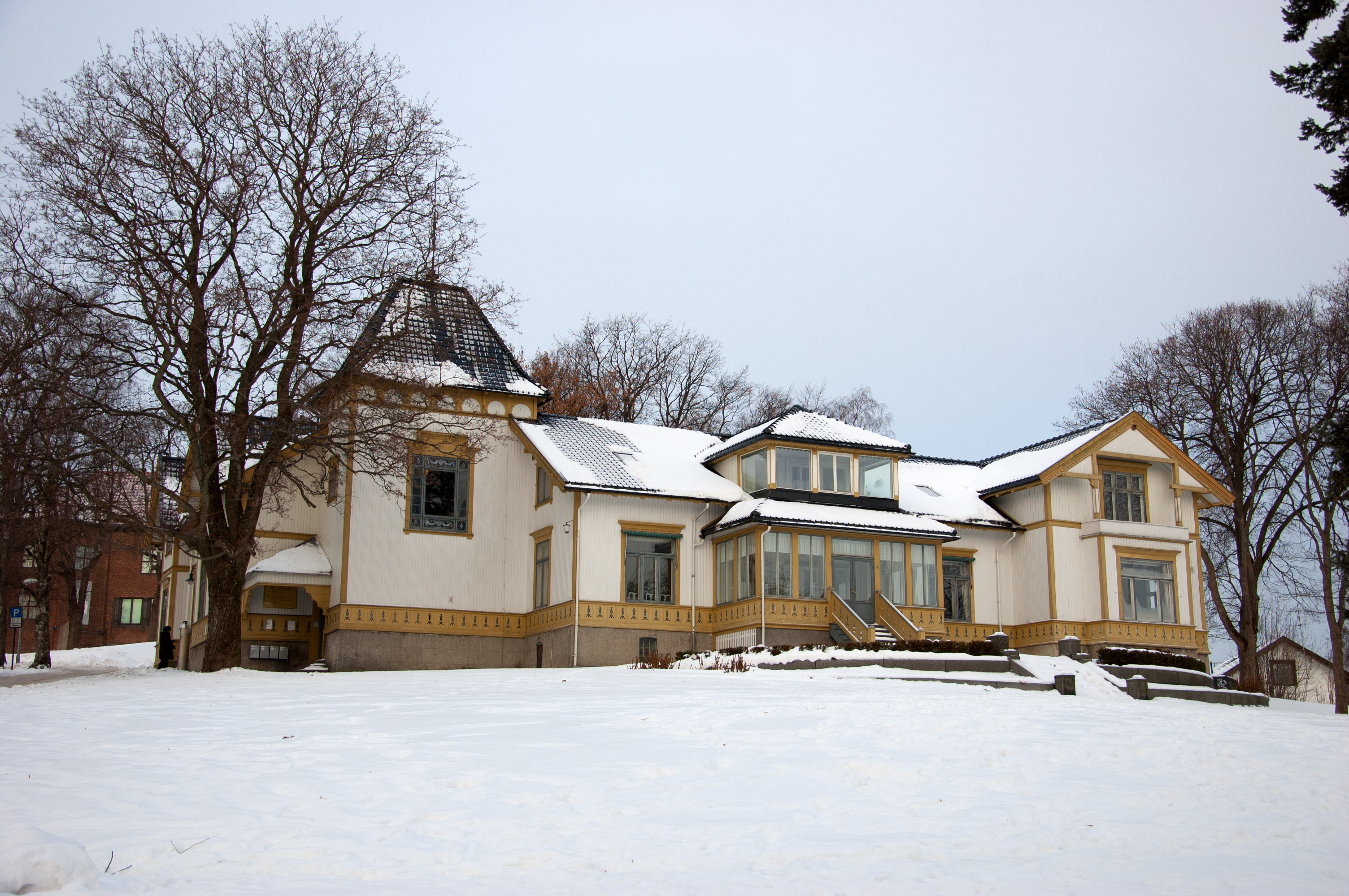 Villa Møllebakken i Tønsberg, oppført i 1890.